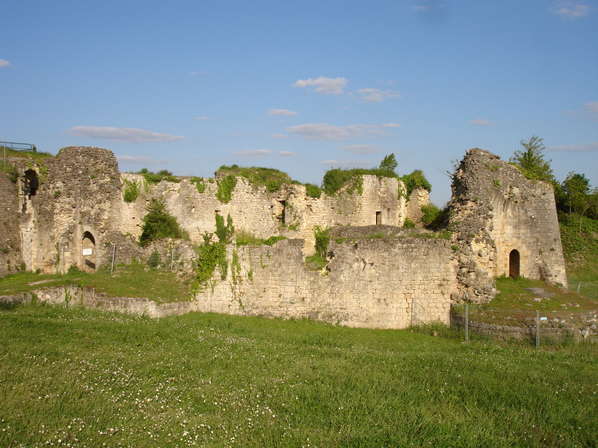 Citadelle de Blaye, Gironde (33), France